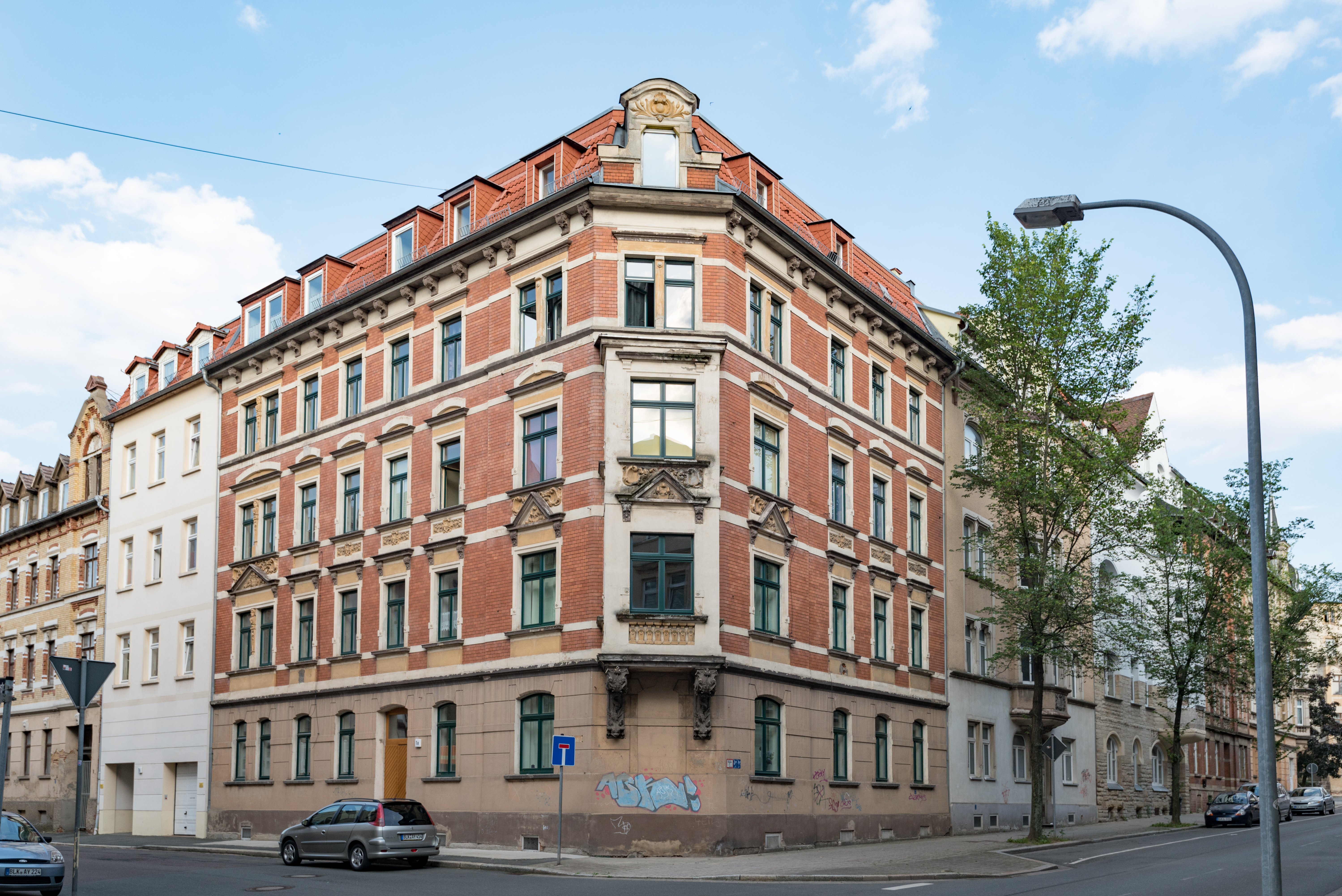 Zeitz, Fichtestraße 1a